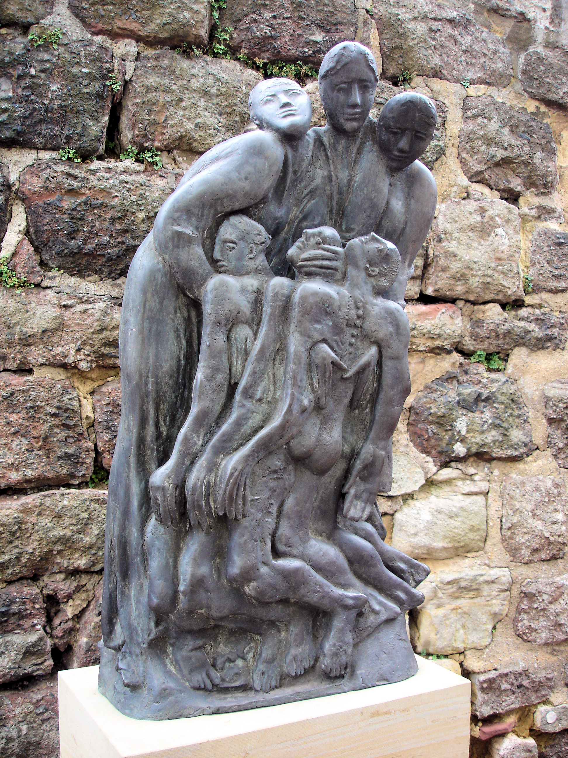 Skulptur "Die Kranken pflegen" von Karl-Heinz Appelt auf der Wartburg in Eisenach, Teil einer siebenteiligen Reihe zum 800. Geburtstag der Heiligen Elisabeth von Thüringen 2007